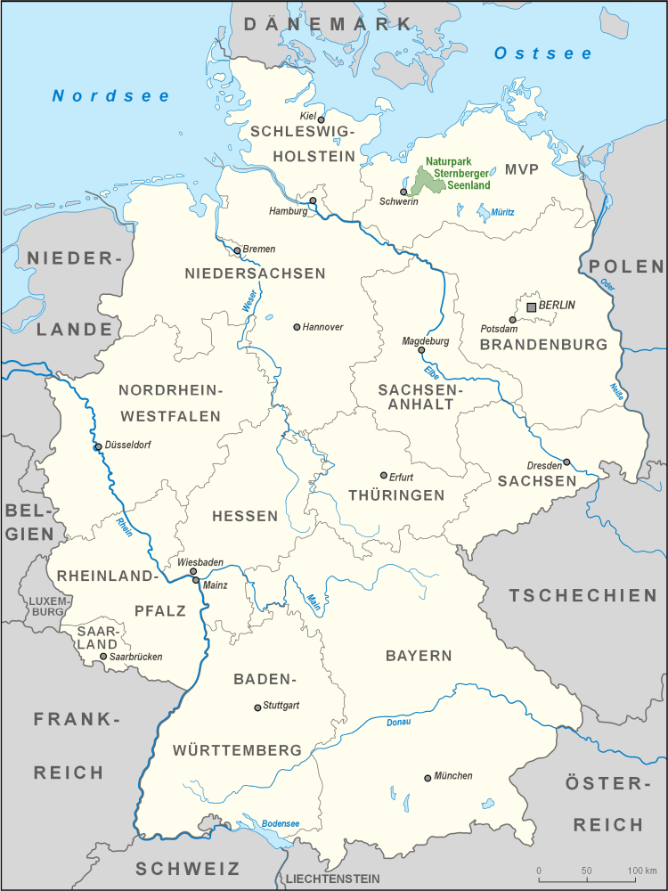 Karte des Naturparks Sternberger Seenland in Deutschland